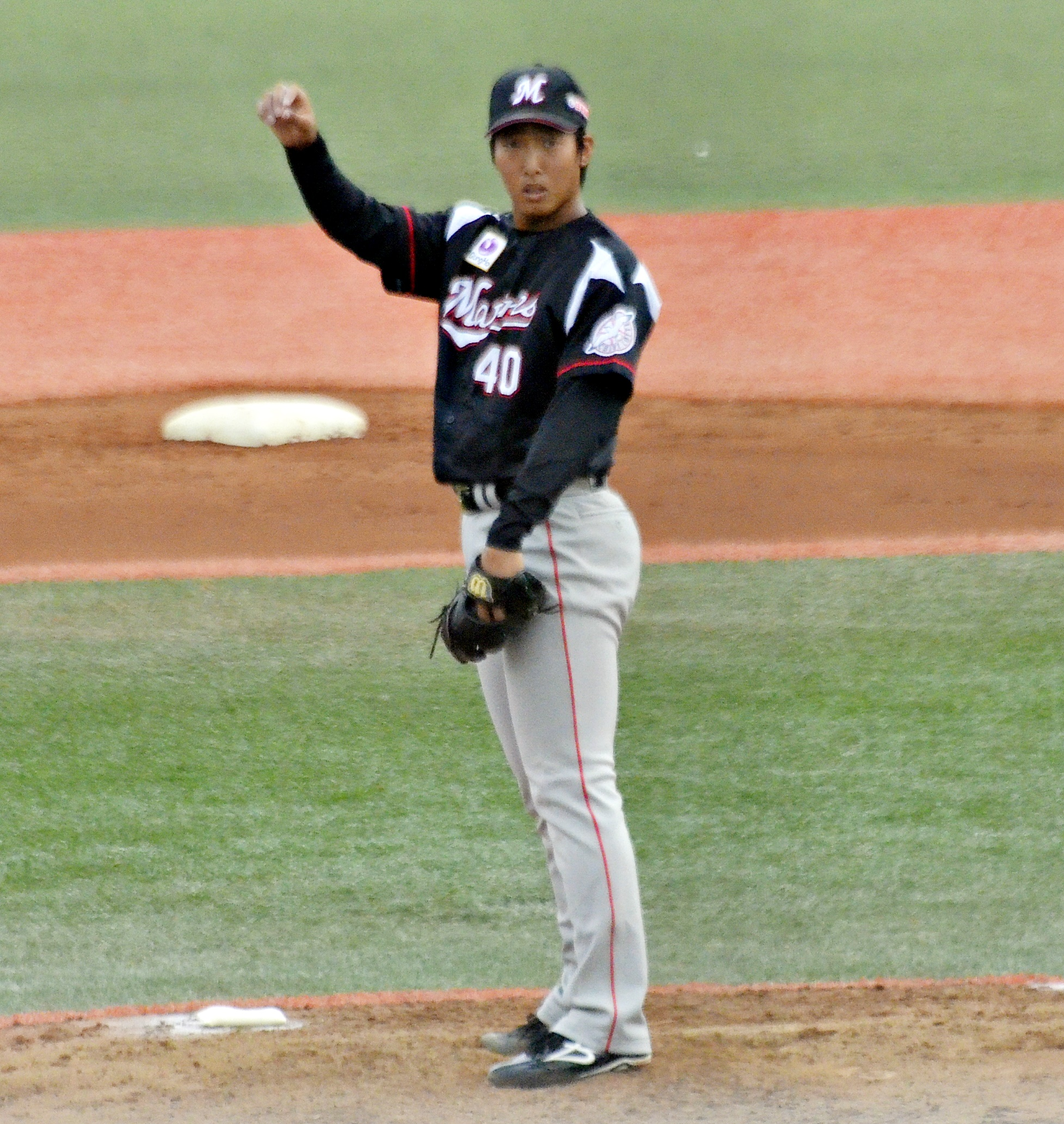 島孝明投手